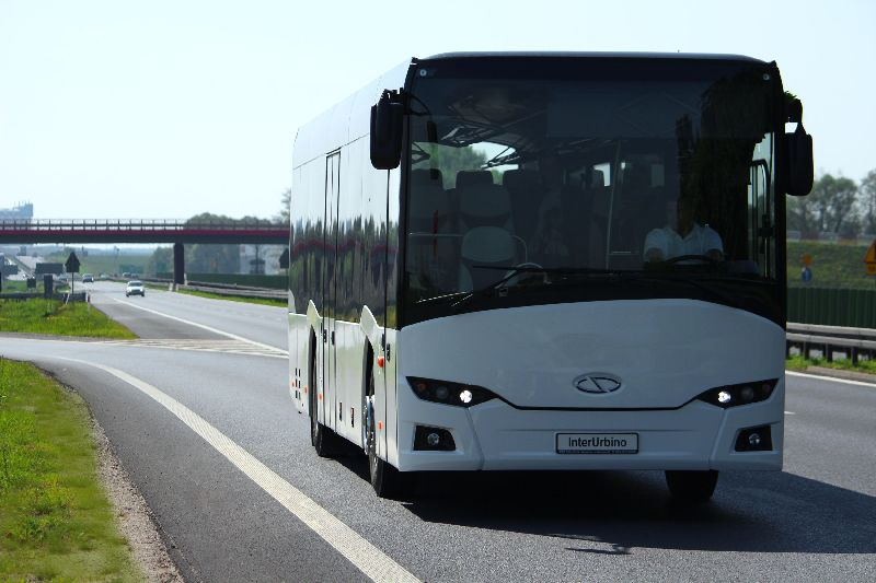 InterUrbino